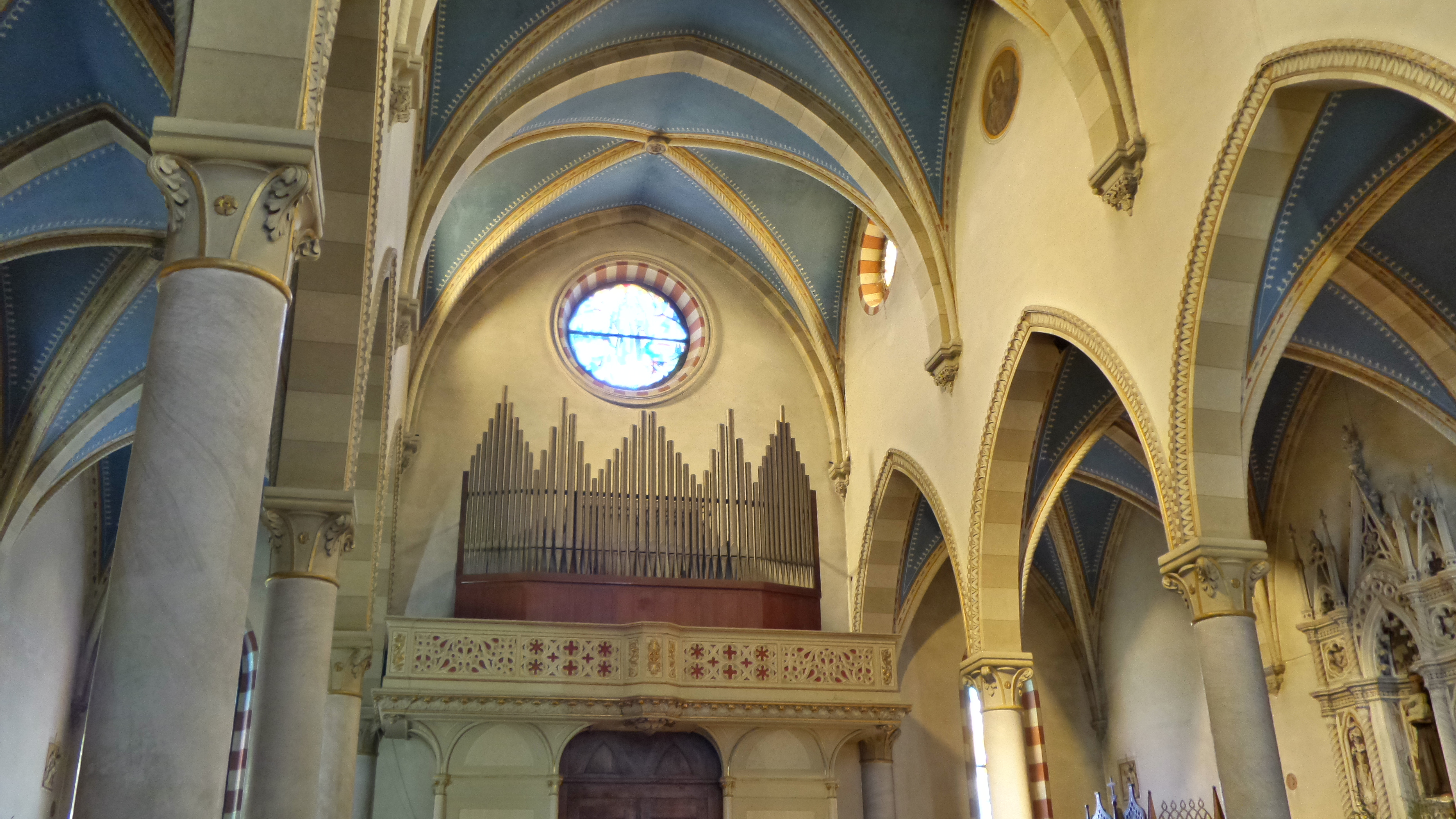 Interno della chiesa di San Michele Arcangelo di Brendola, dal lato dell'ingresso